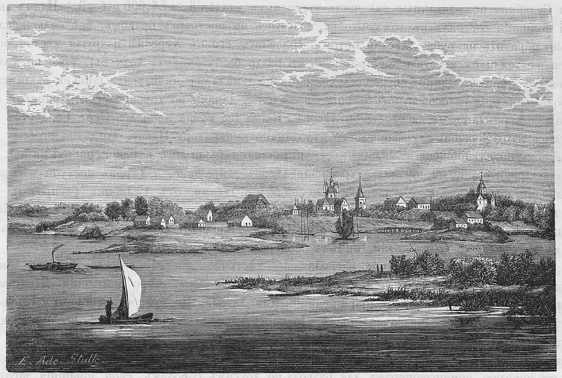 Беларуская (тарашкевіца): Тураў (Turaŭ) з боку ракі Прыпяць (Prypiać)